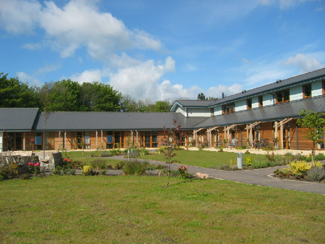 Roxburghe House, Aberdeen